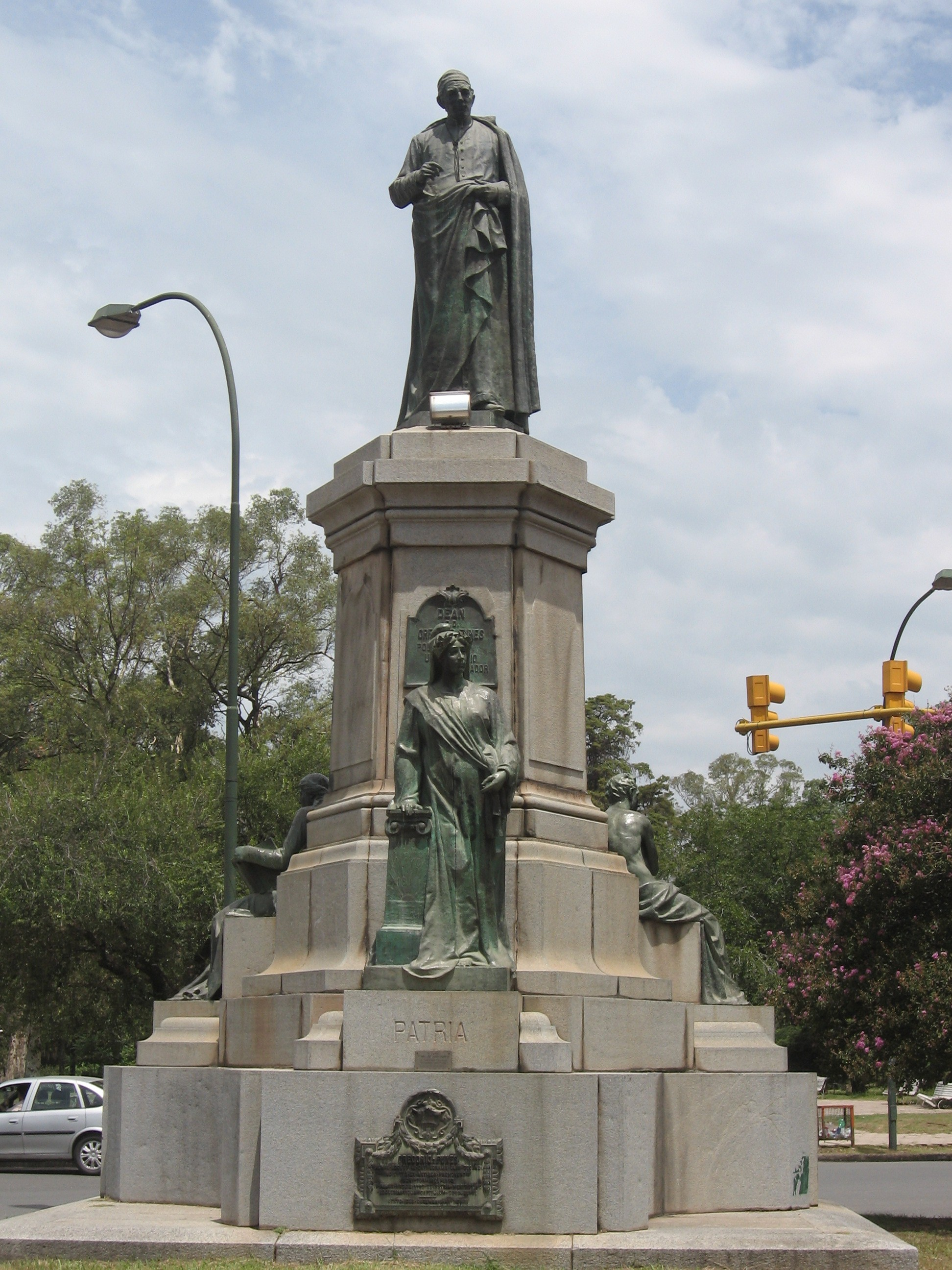 Estatua del Dean Funes, en la ciudad de Cordoba